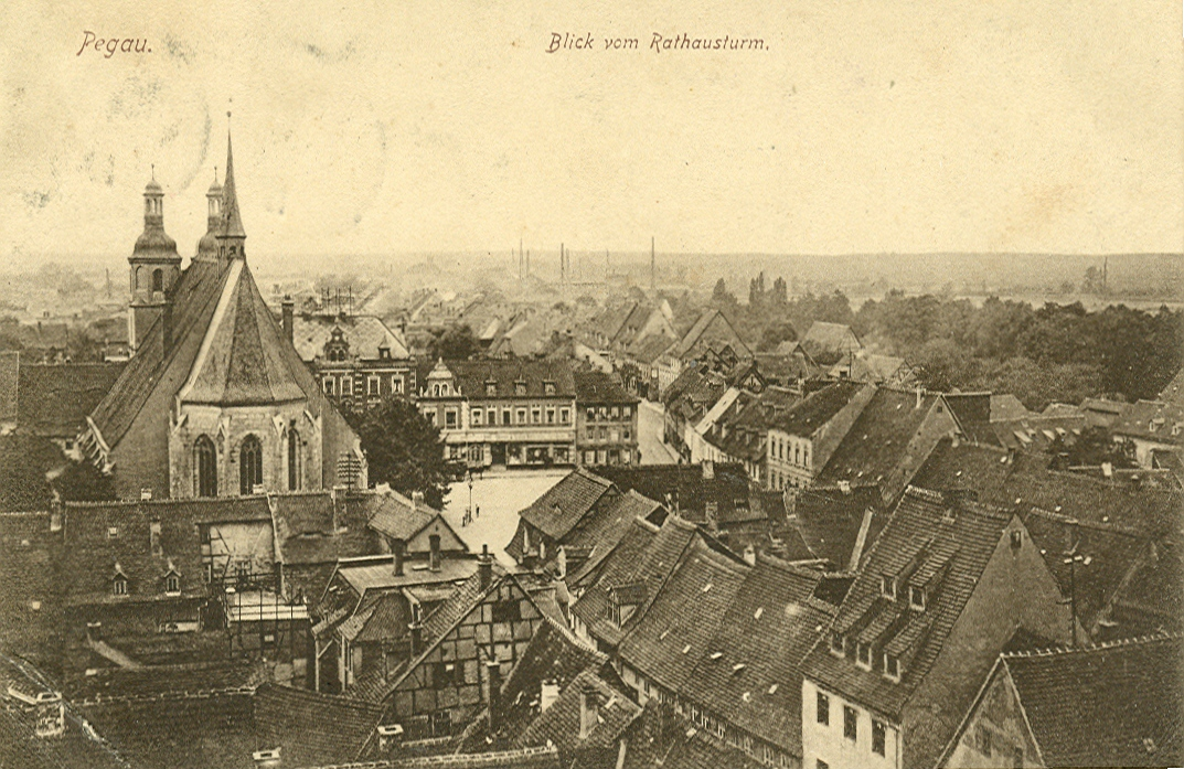 Postkarte, undatiert ( ca.1914 ). Beschriftung: "Pegau - Blick vom Rathausturm".